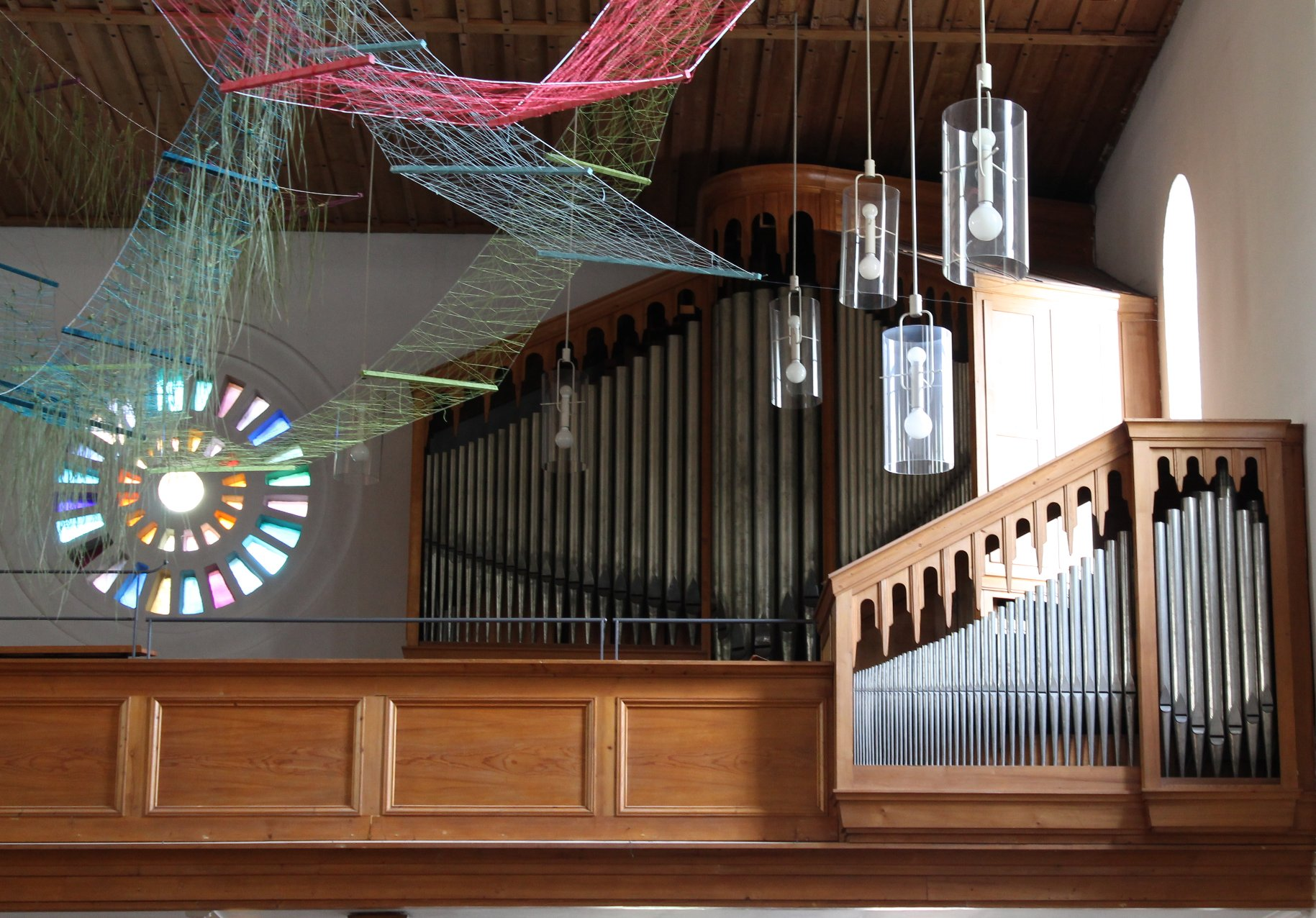 Orgel von Christi Himmelfahrt in Freising (1953, Paul Ott, II/23)